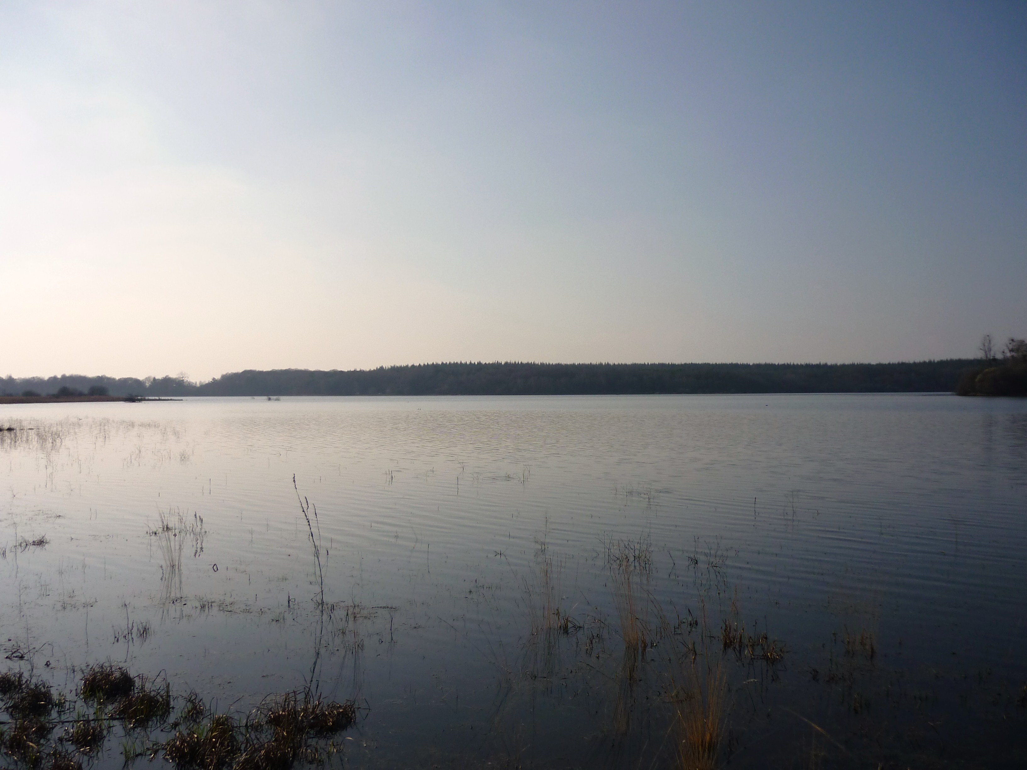 Etang de Boulet à Feins, Ille-et-Vilaine, Bretagne